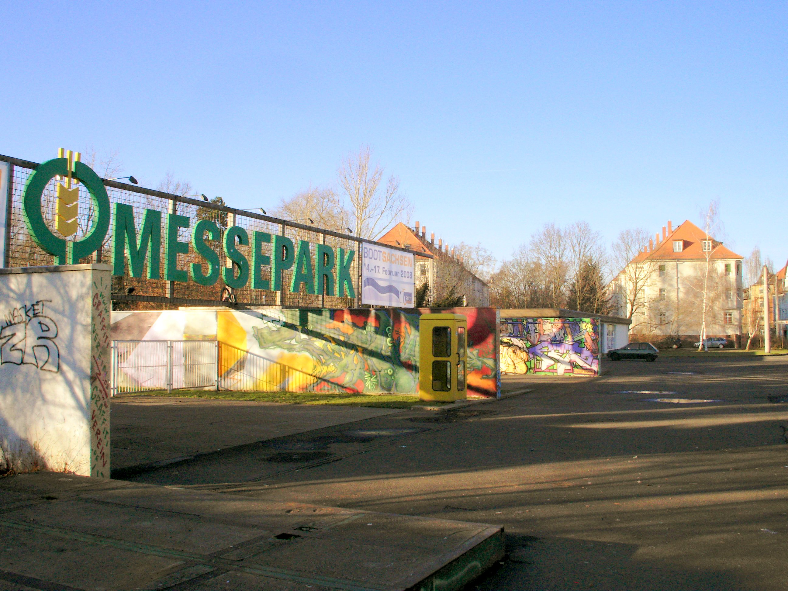 Eingangsbereich des agra-Ausstellungsgeländes in Leipzig